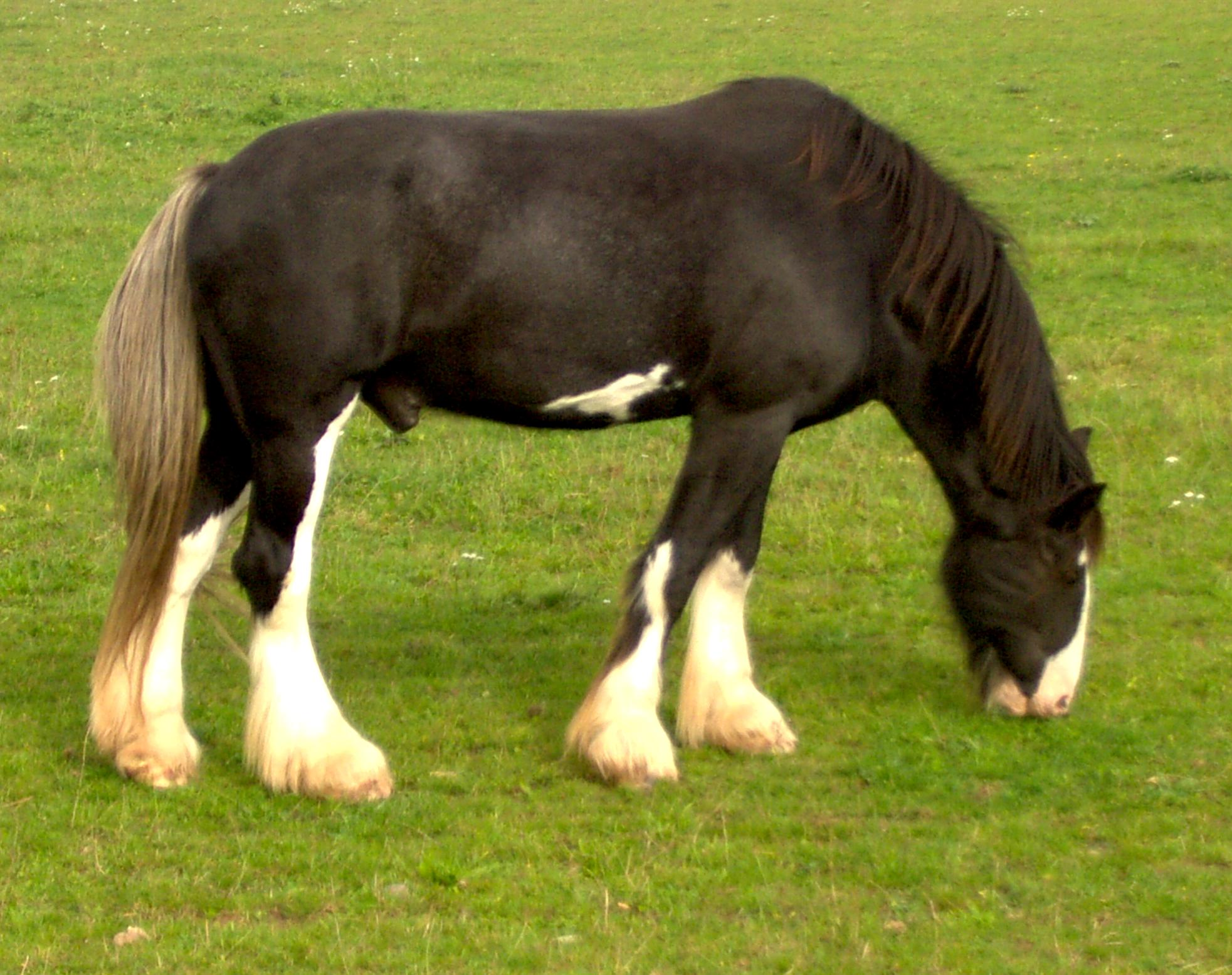 Shire Horse im Erfurter Zoopark